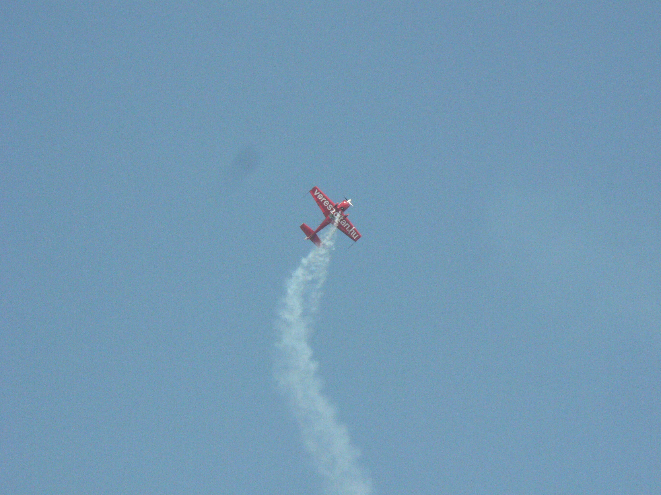 Veres Zoltán műrepülése 2006. augusztus 20-án a Duna-parton, Budapesten